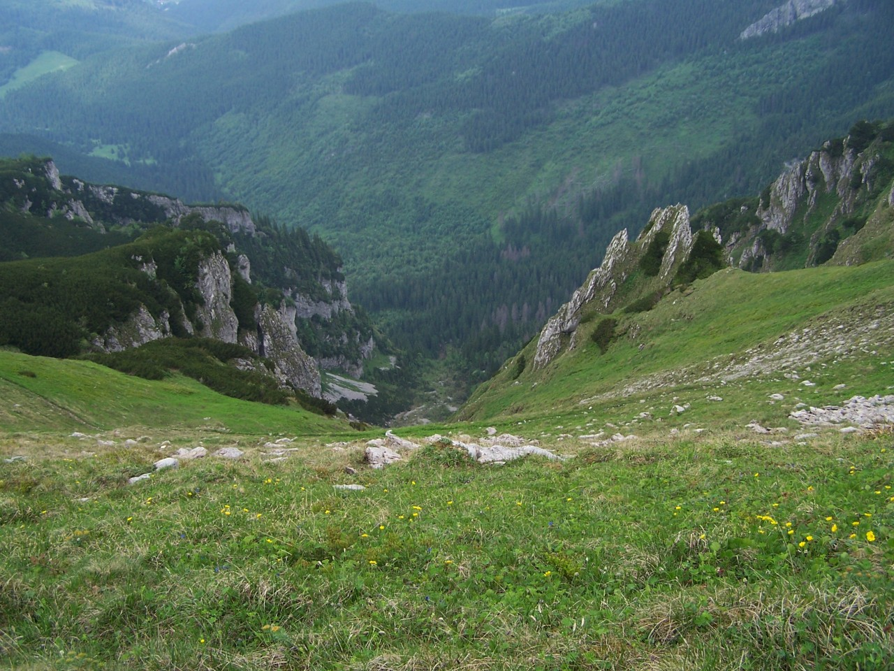 Mała Świstówka,w dole Dolina miętusia. Widok z Upłaziańskiej Kopy